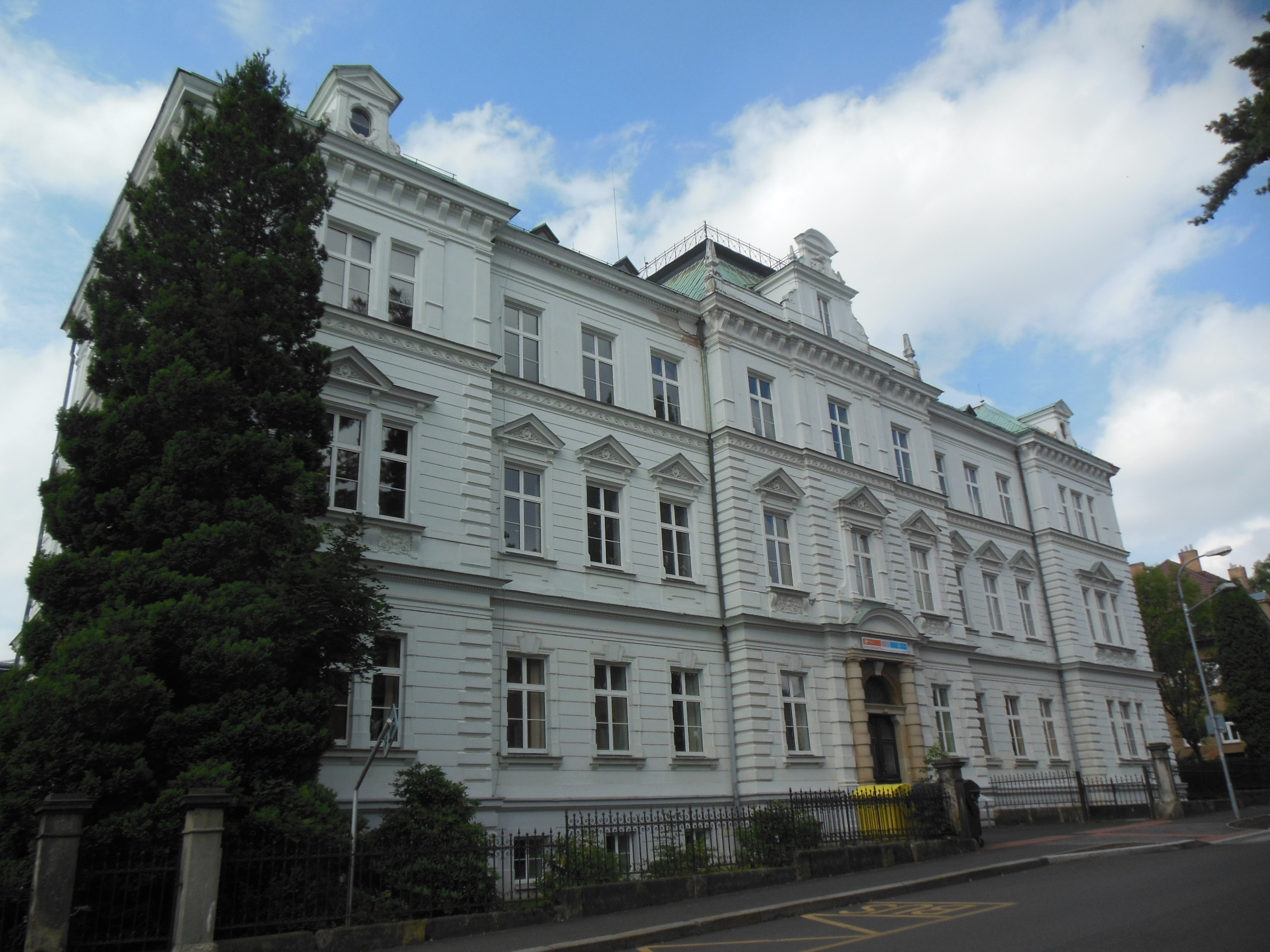 Nový Bor (okres Česká Lípa). Wolkerova č. p. 316, VOŠ sklářská a SŠ.